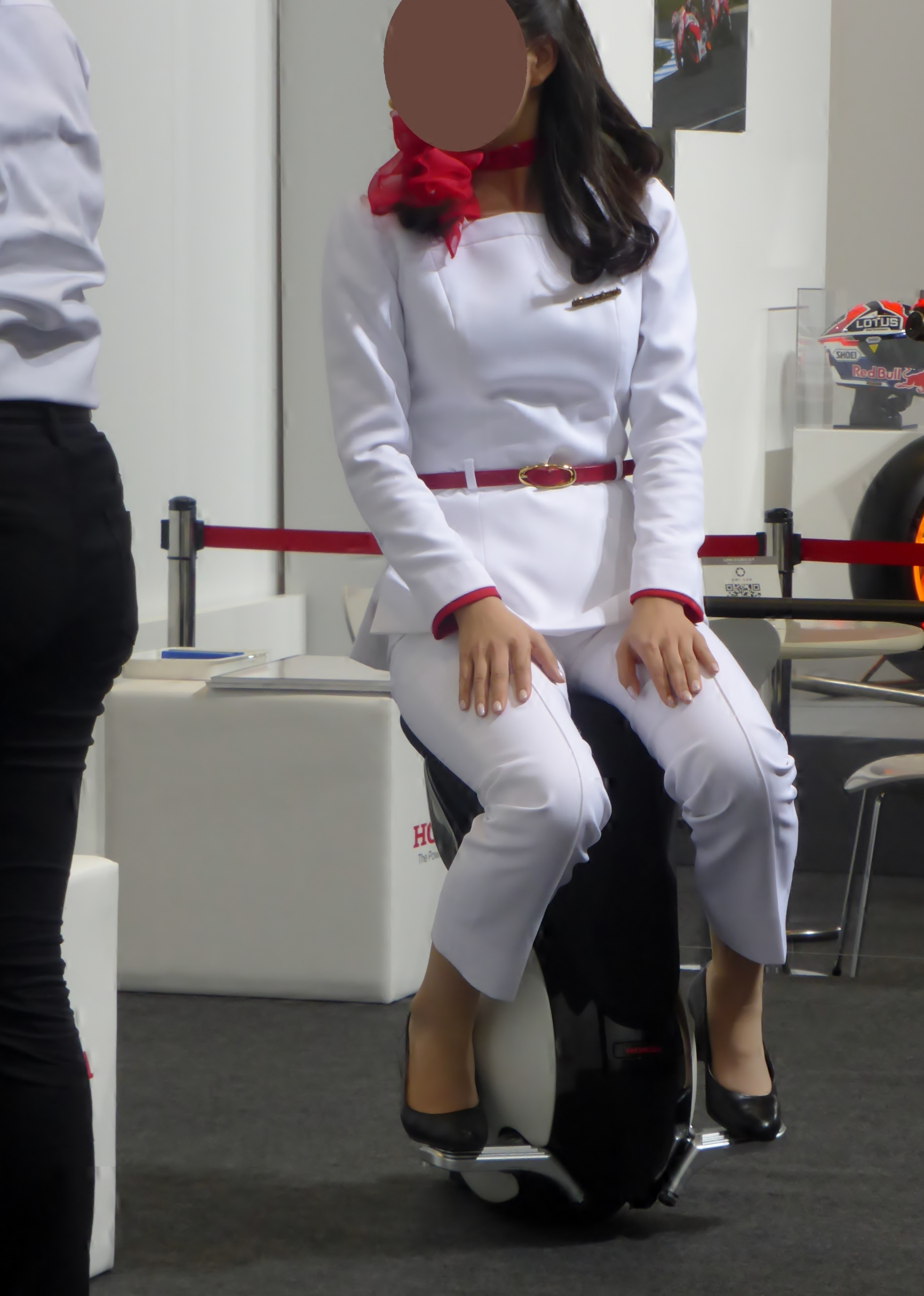 大阪モーターショー2013のホンダブースにおいてUNI-CUB βを撮影。